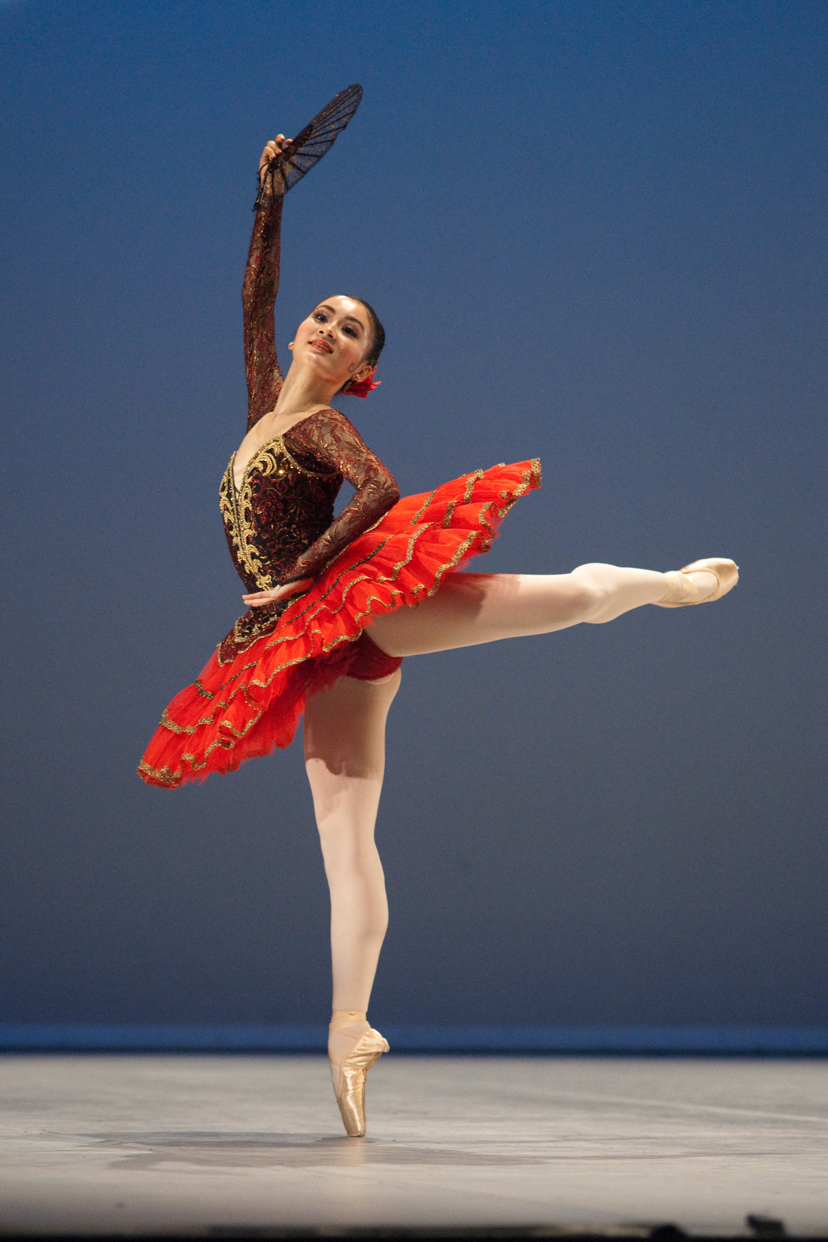 Variation extraite de Don Quichotte au Prix de Lausanne 2010. The making of this document was supported by Wikimedia CH. (Submit your project!) For all the files concerned, please see the category Supported by Wikimedia CH.